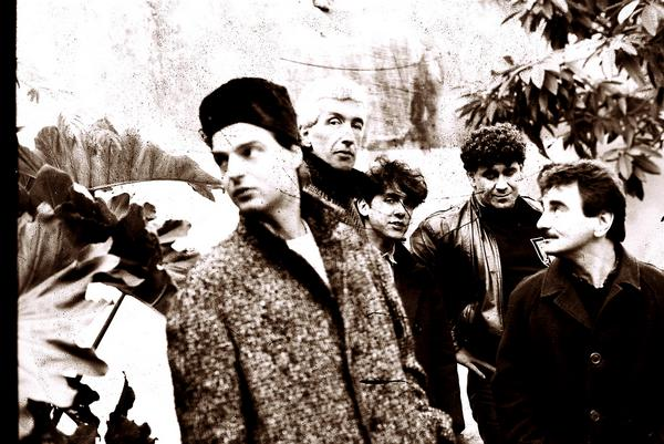 Alphonso S´Entrega